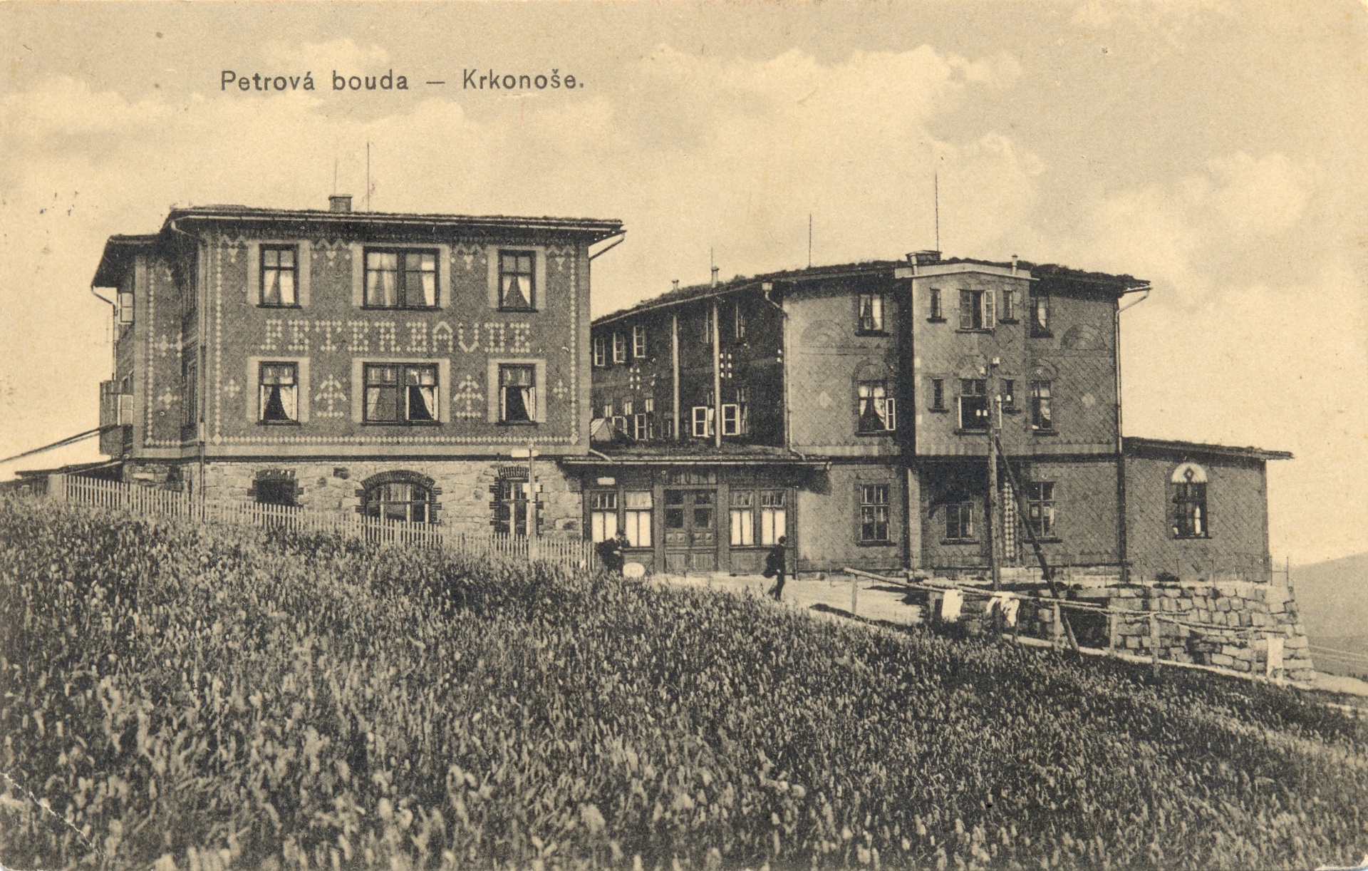 Petrova bouda